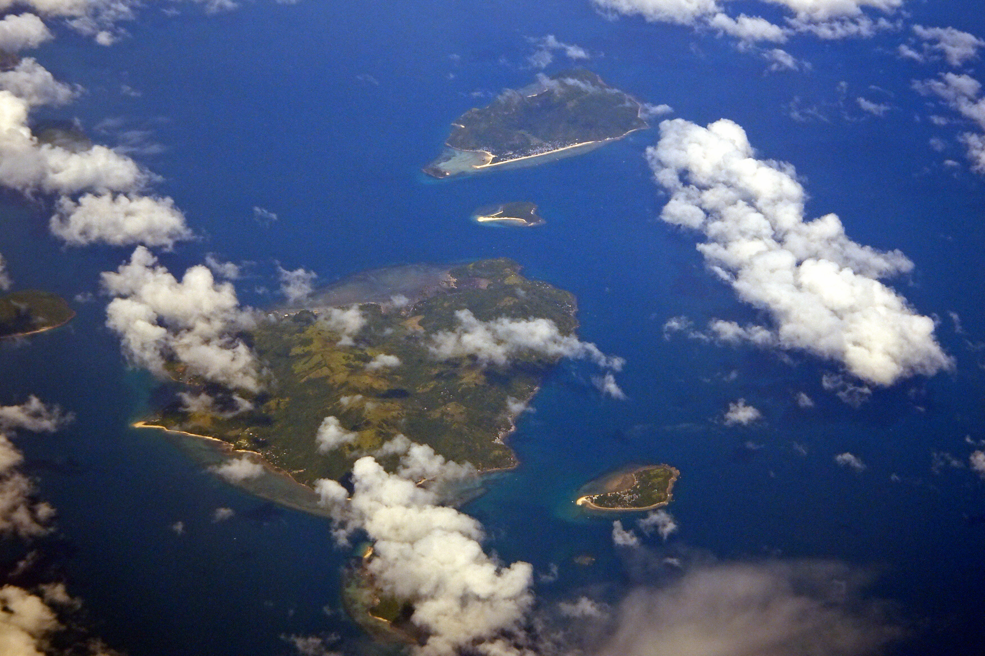 Igbon Island, Iloilo, Philippines